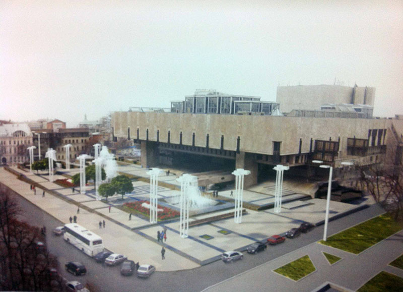 Площадь фонтанов после реконструкции 2015 года.